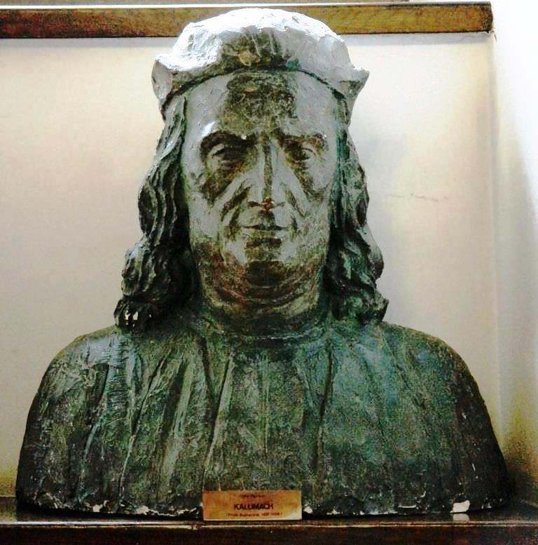 Büste des italienischen Humanisten Filippo Buonaccorsi (lateinisch Philippus Callimachus Experiens), 1437-1497, im Collegium Maius, Krakau (Polen).